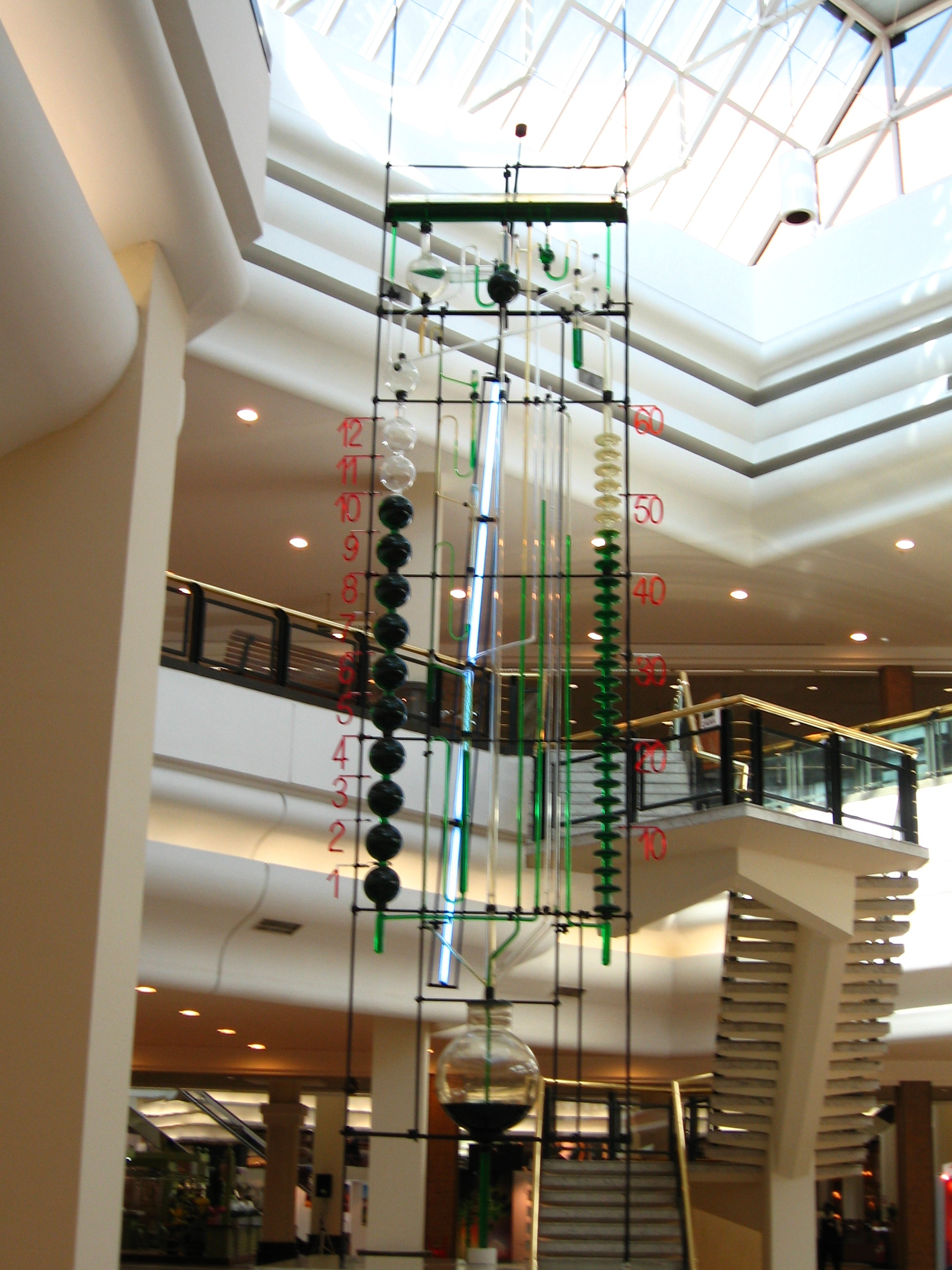 Relógio das águas - Iguatemi Porto Alegre - RS